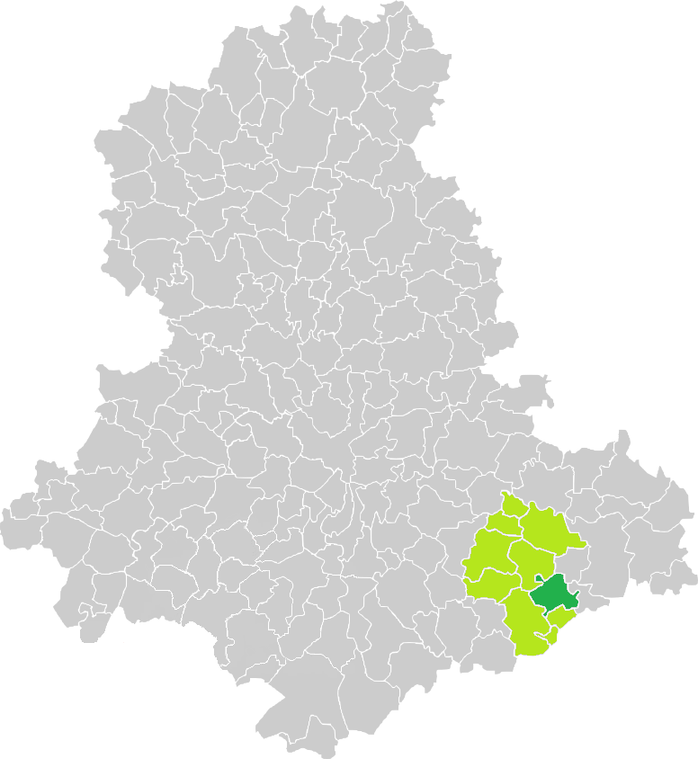 Carte de situation de la commune de Sussac (en vert foncé) dans le votre Canton (en vert clair) sur une carte des communes de la Haute-Vienne